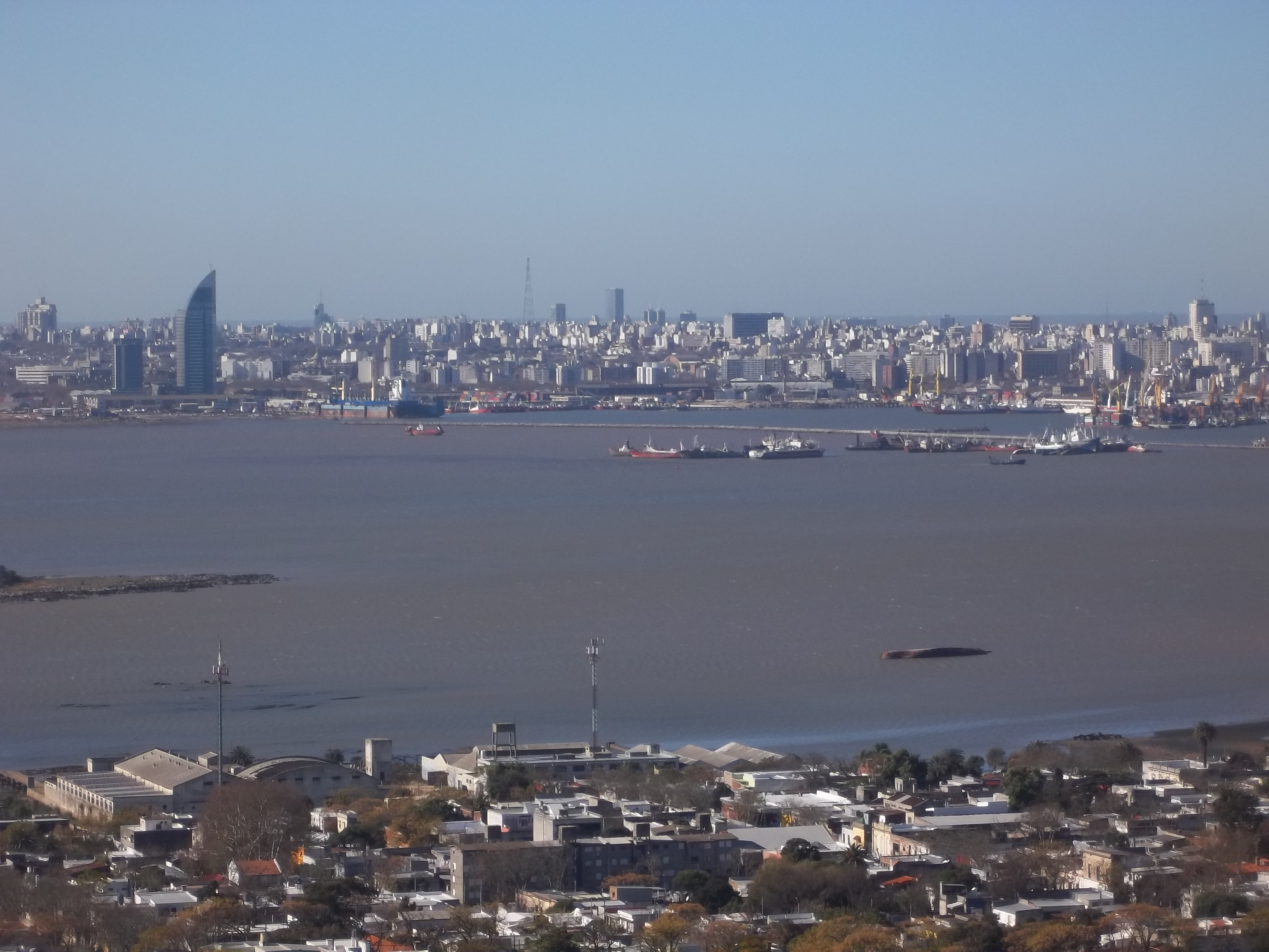 Esta foto fue tomada desde el mirador del Cerro de Montevideo